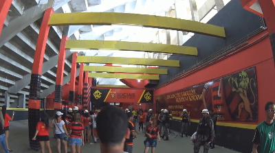 sede social da ilha do retiro.